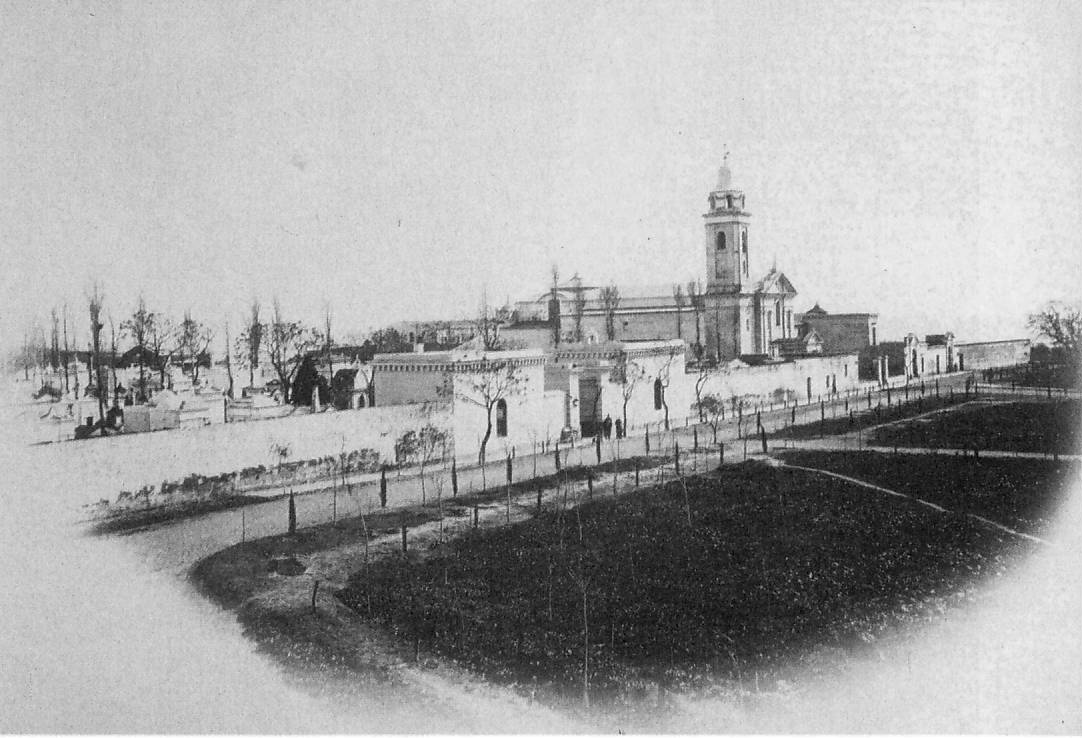 Plazoleta de la Recoleta. En la imagen aparecen el Cementerio y la Iglesia Nuestra Señora del Pilar. El autor falleció en 1894.